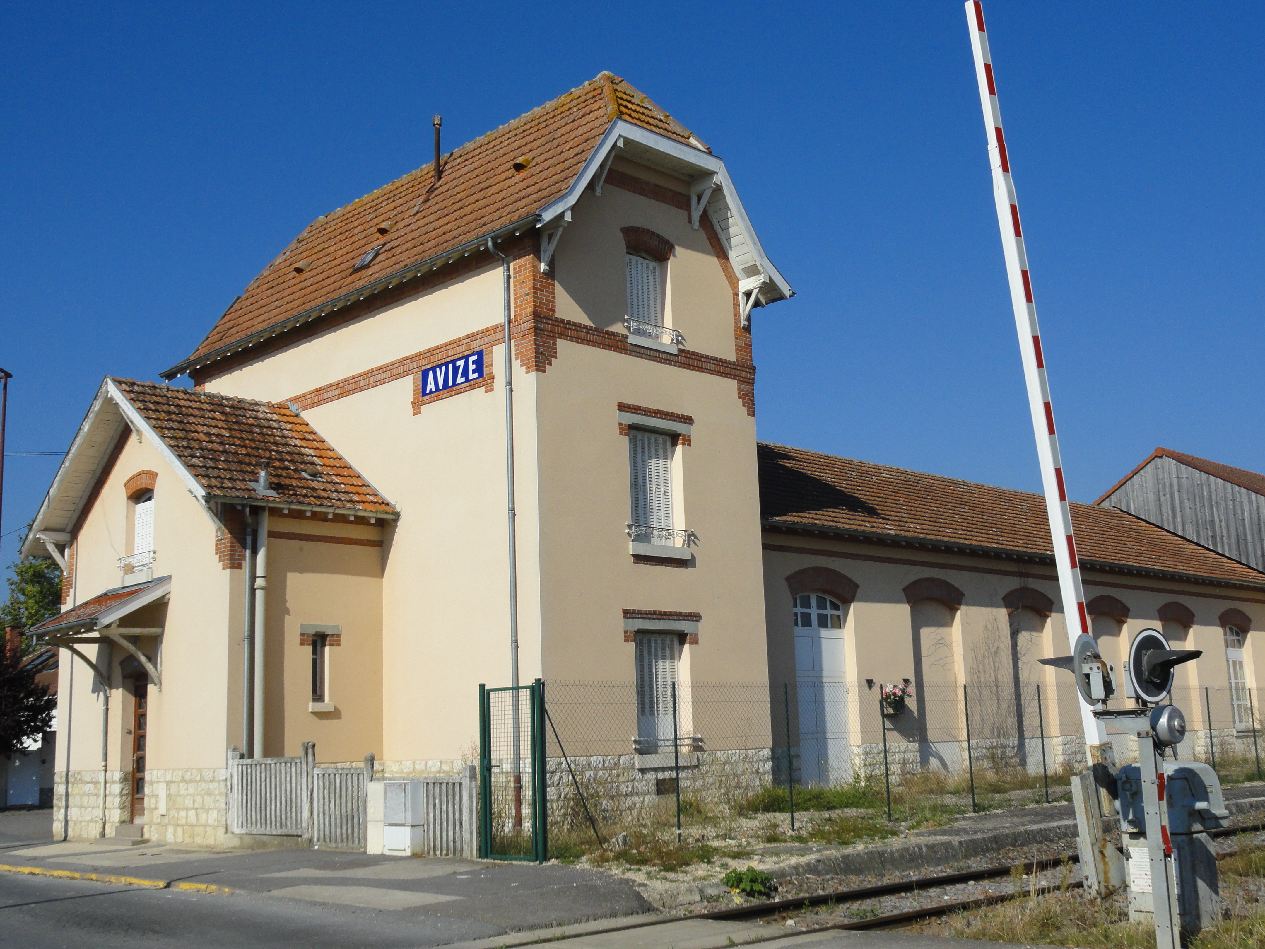 Ancienne gare d'Avize